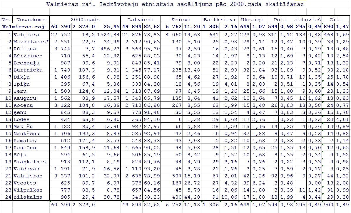 результаты переписи населения Латвии ни 01.04.2000